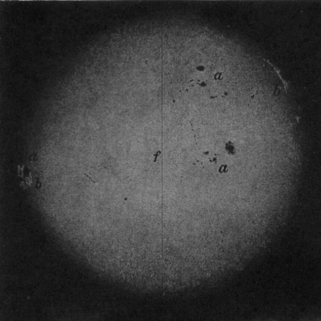 Sonne (nach Photogr. von Lohse in Potsdam); a Flecken; b Fackeln; f Orientierungsfaden im Fernrohr